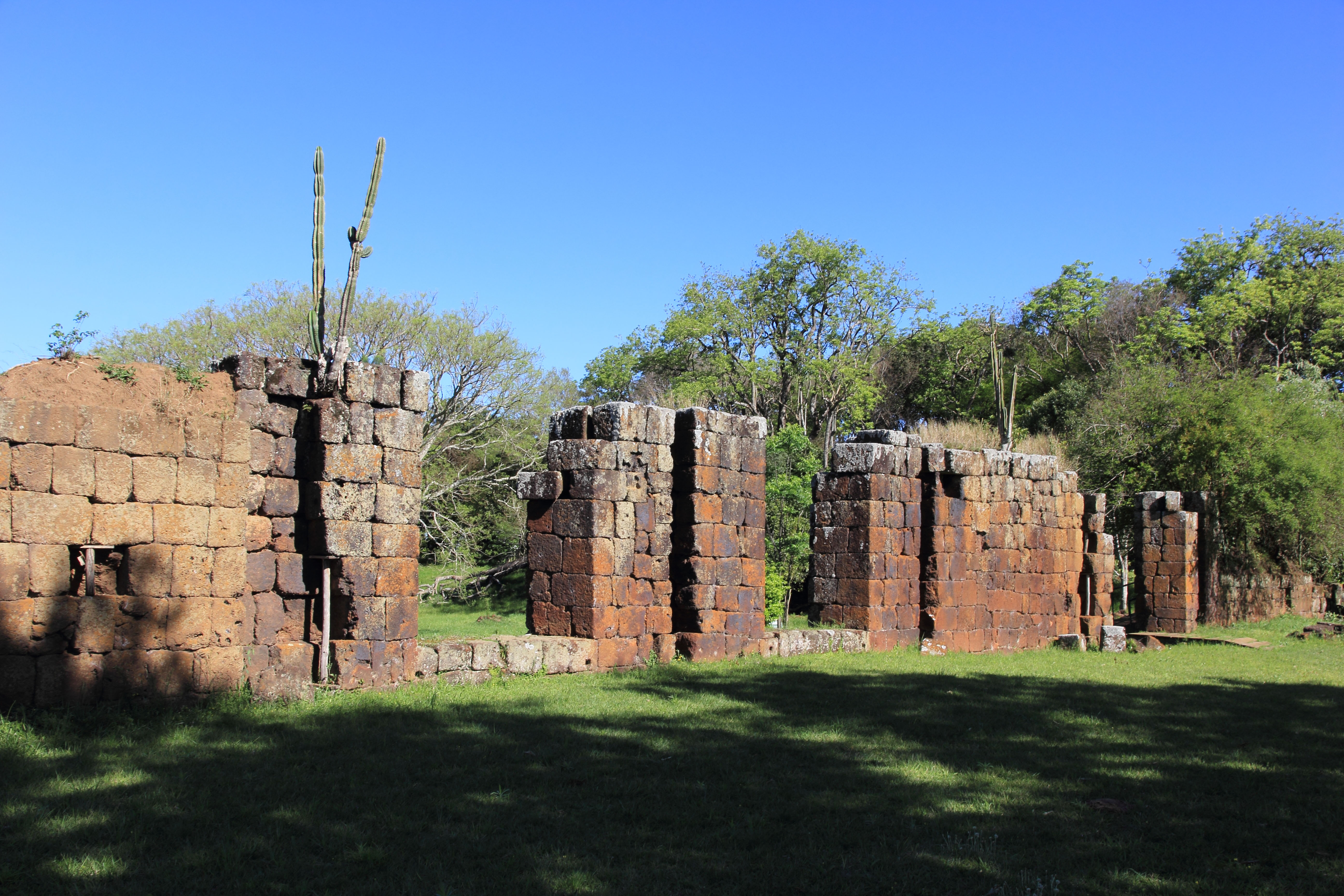 Sítio Arqueológico de São João Batista em Entre-Ijuís, RS.